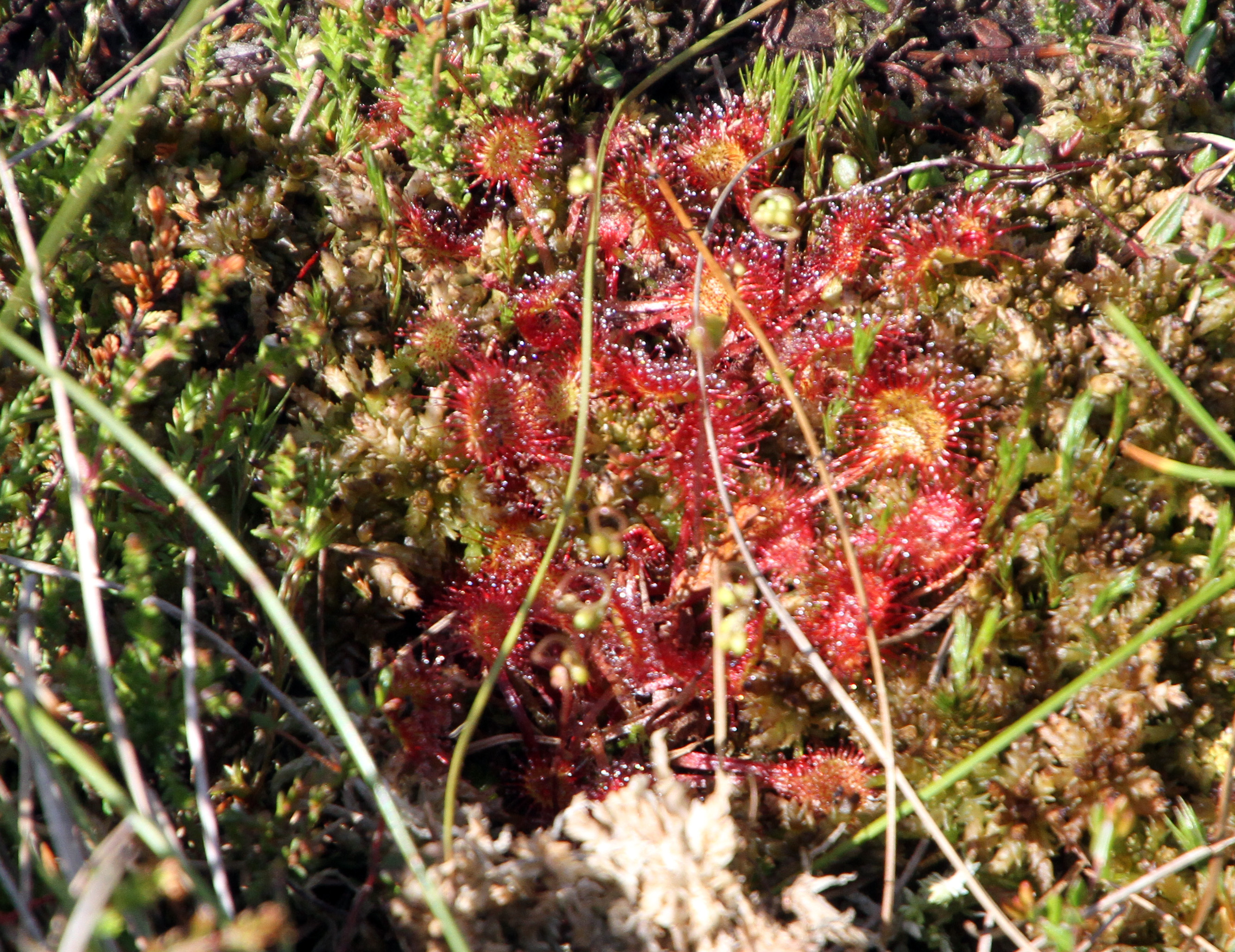 Schwarzes Moor in der Rhön in Hessen